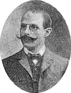 Josef Seliger (1870 - 1920), Československý politik.